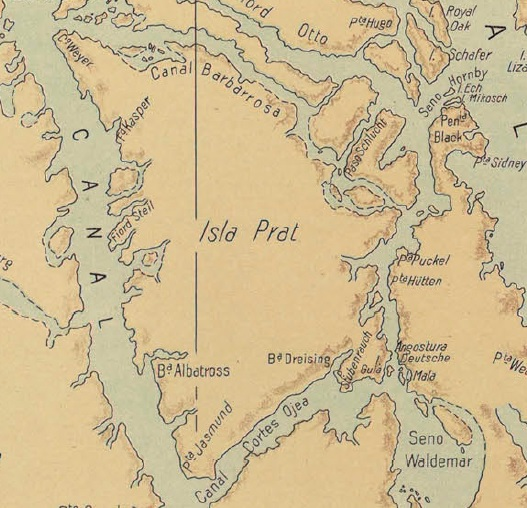 La imagen es un detalle del “Atlas Centenario”, desarrollado por la Oficina de Mensura de Tierras del Gobierno de Chile dirigida por don Luis Risopatrón con ayuda de los cartógrafos Nicanor Boloña y Luis Ossandón. Esta obra fue desarrollada por orden del Presidente de la República don Pedro Montt y publicada en el año del centenario de la república en 1910.